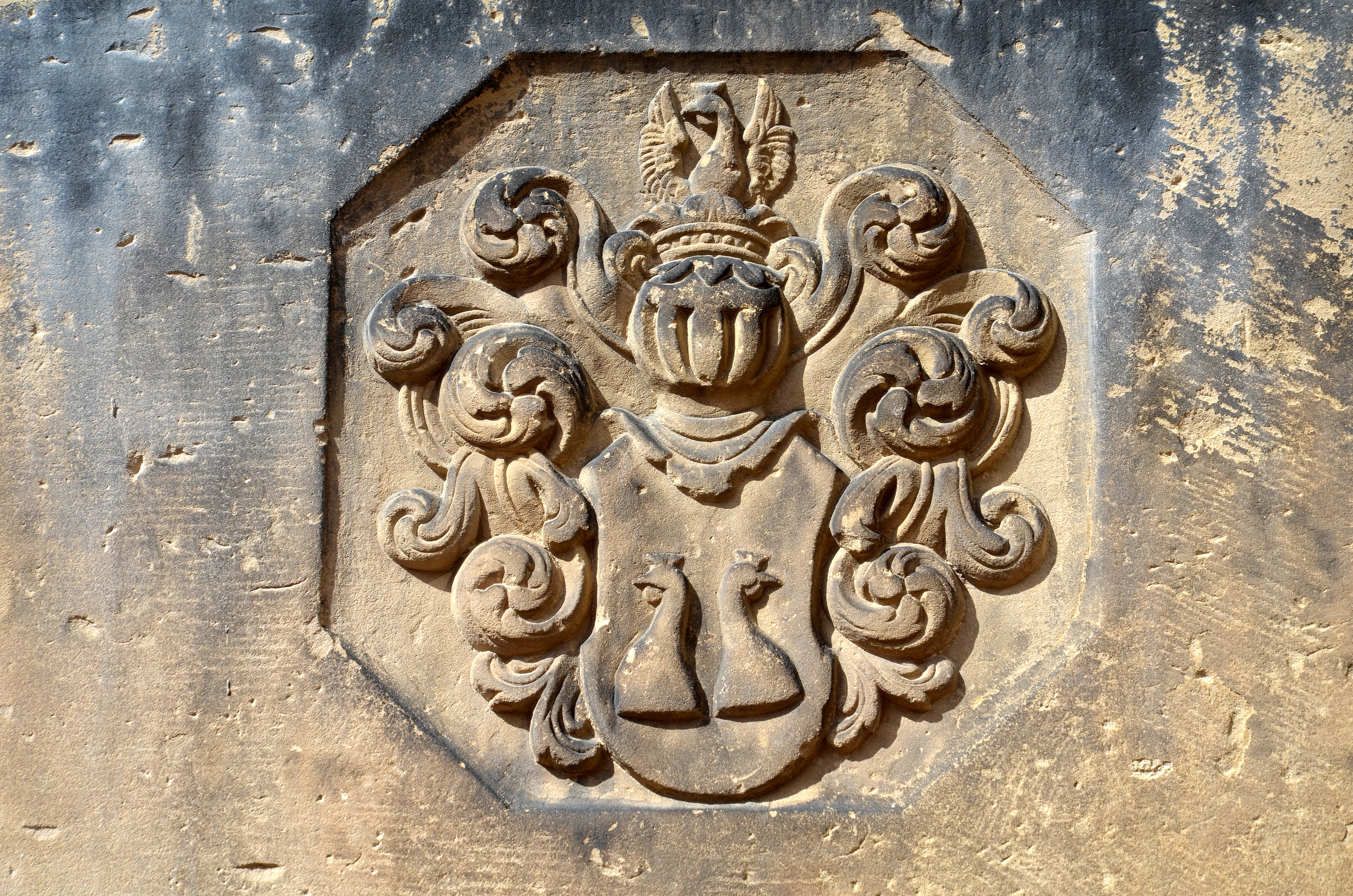 Wappen auf dem Doppel-Grabstein (heute Epitaph) an der südlichen Kirchturmmauer der Neustädter Hof- und Stadtkirche St. Johannis in Hannover, Stadtteil Calenberger Neustadt, für den Kurfürstlich Hannoversche Hofdame Anna Catharina von Offen ...